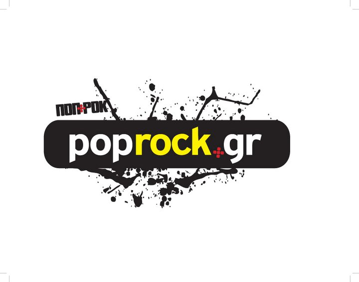 ποπροκ